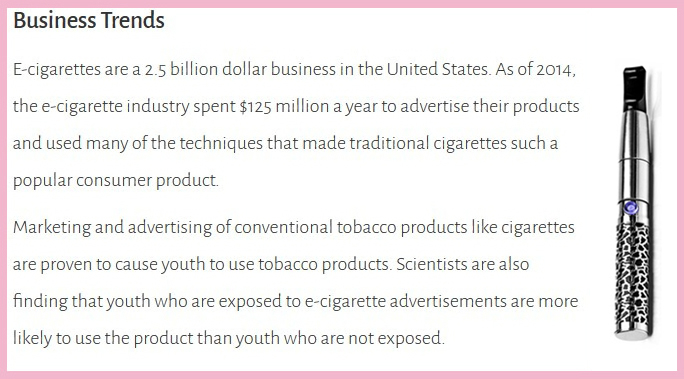 Trend przemysłu e-papierosów.